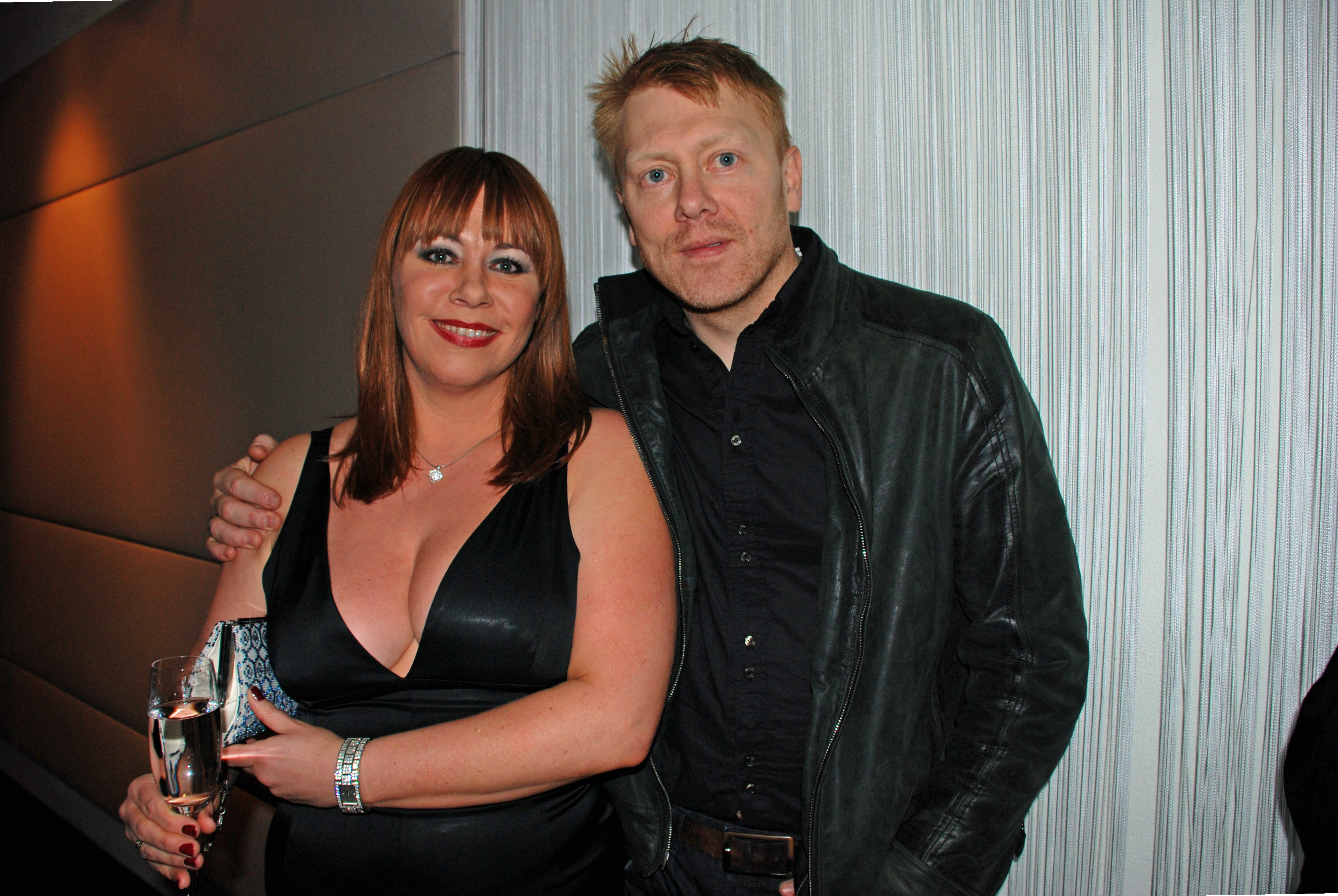 Jón Gnarr og Helga Braga á Edduverðlaununum árið 2007